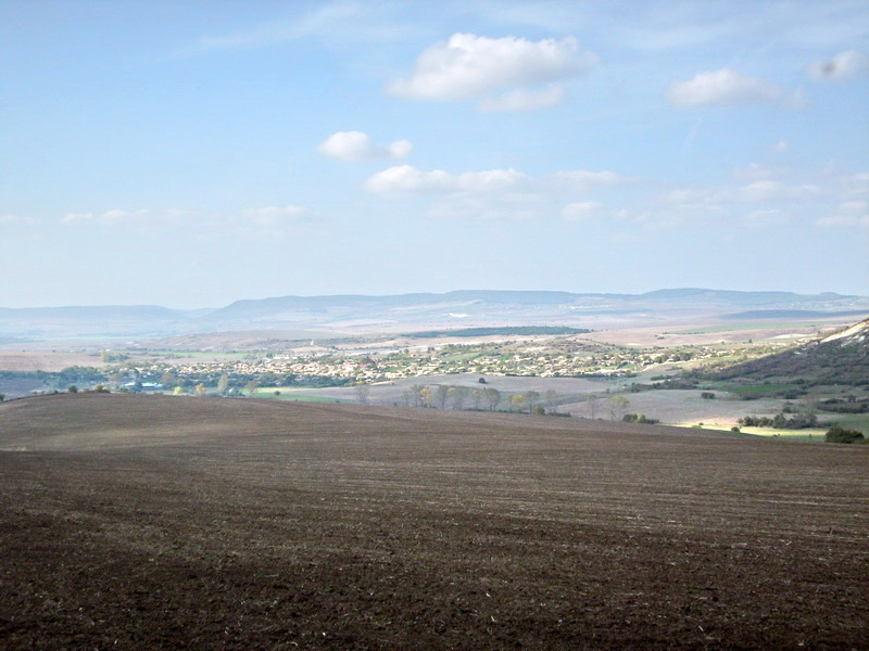 Поглед към село Дриново, община Попово от подножието на хълма Ойнарджа.